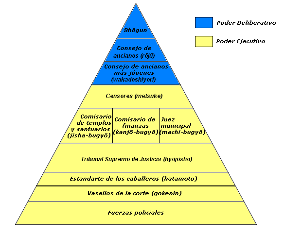 Estructura del bakufu durante el Shogunato Tokugawa. Origen /